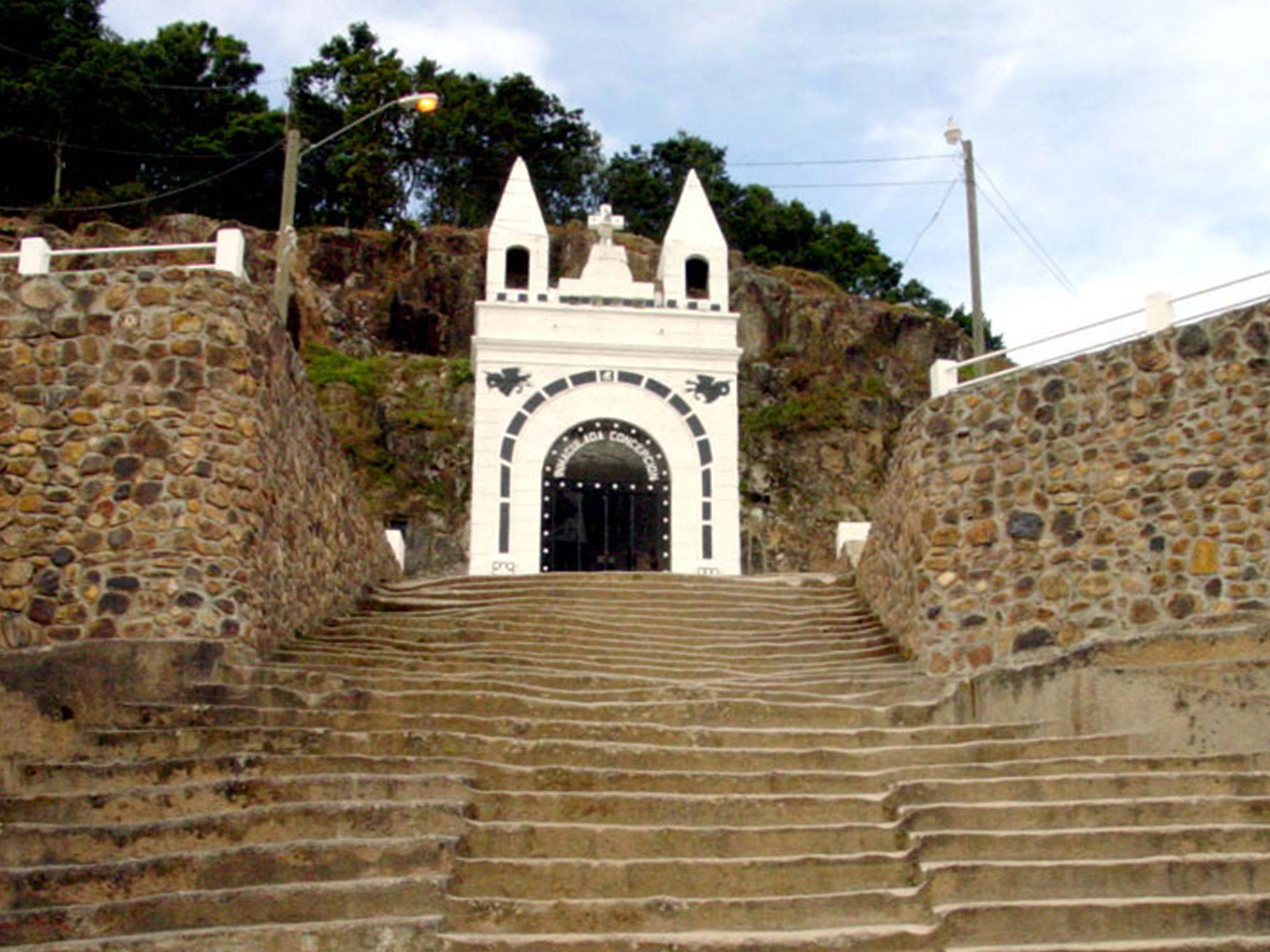 La Esperanza in Intibucá, Honduras. Paseo Turístico La Gruta en la ciudad de La Esperanza, Intibucá. Uno de los hermosos e importantes parajes Turísticos e Historicos de la Ciudad que se remonta a la epóca Colonial. Dentro de la edificación se encuentra la imagen de la virgen "Inmaculada Concepcion", En este lugar cada viernes santo la feligrecia Catolica de la region celebran el via crucis. Aparte de su belleza arquitectonica, por estar construida sobre piedra cuenta con hermoso y ambiente natural compuesto por un semidenso bosque de pinos. Es tradicon de propios y visitantes el de lanzar dinero dentro de las rejas que resguardan la imagen de la virgen como ofrenda por peticion de gracia ante la misma comunmente se conoce como "Limosna para el santo" y tambien lo realizan dentro de las iglesias en los ofrendarios de muchas imagenes.